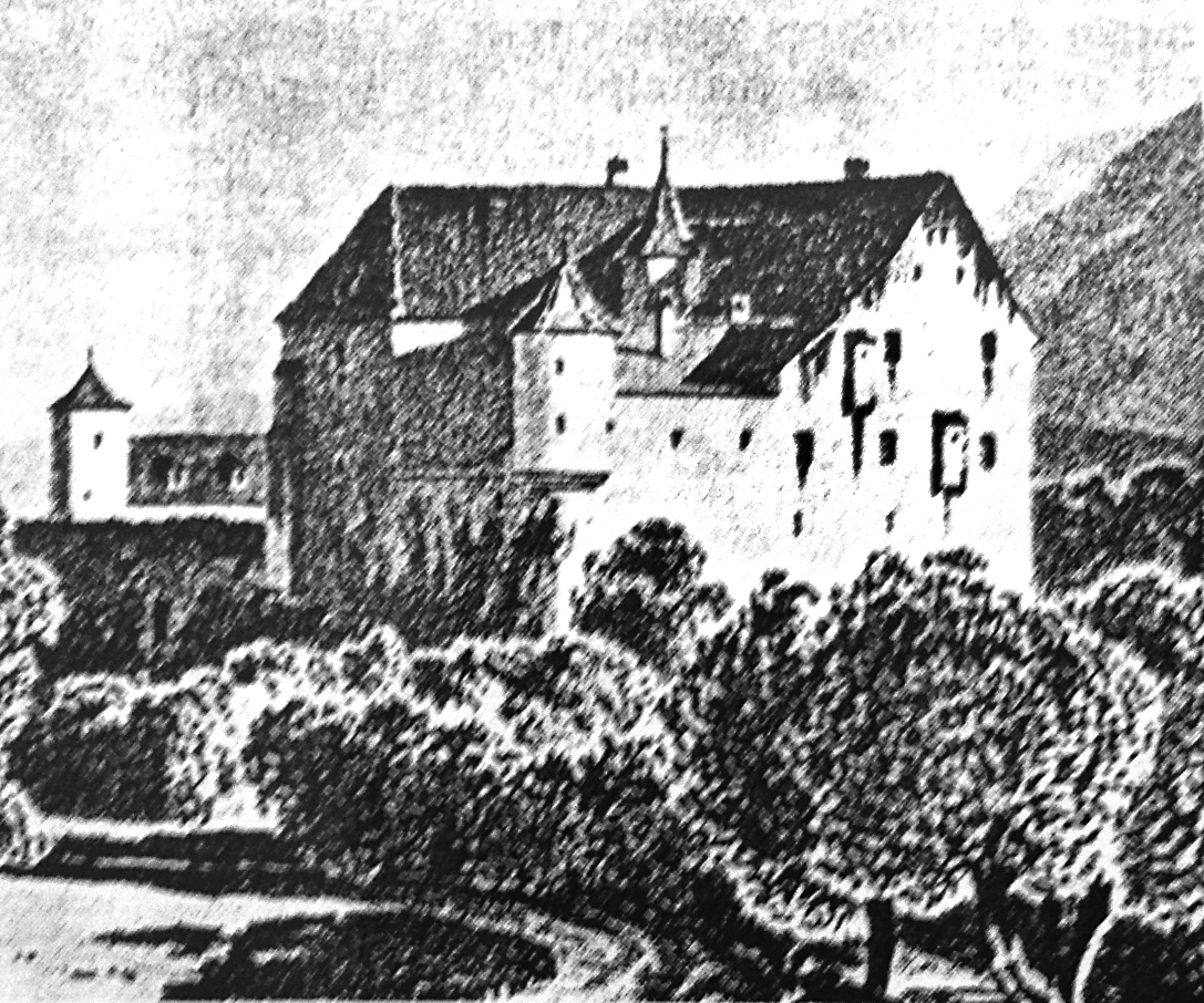 Lithographie d'après J.Rothmuller représentant le château de Hartmannswiller vers 15e siècle.